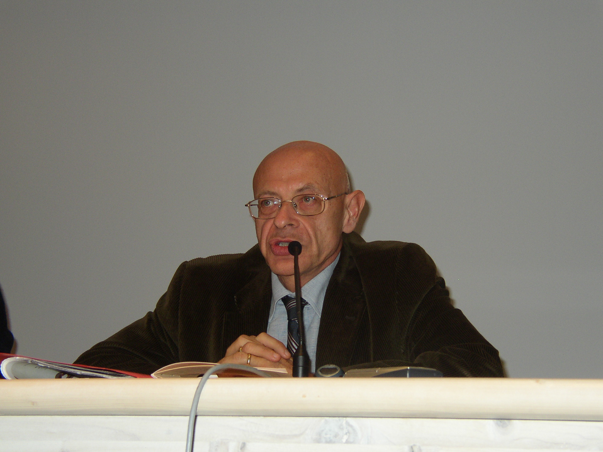 Paolo Serventi Longhi, segretario della Federazione Nazionale della Stampa Italiana (Fnsi), nel corso del suo intervento a Volo Radente, X seminario di formazione per giornalisti organizzato da Redattore Sociale